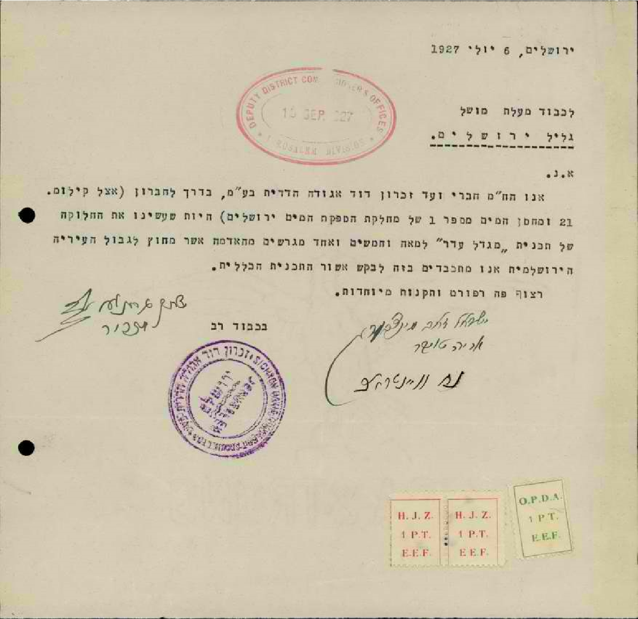 נח גד וינטרוב מיוזמי מגדל עדר במכתב למושל ירושלים על תוכנית המתאר